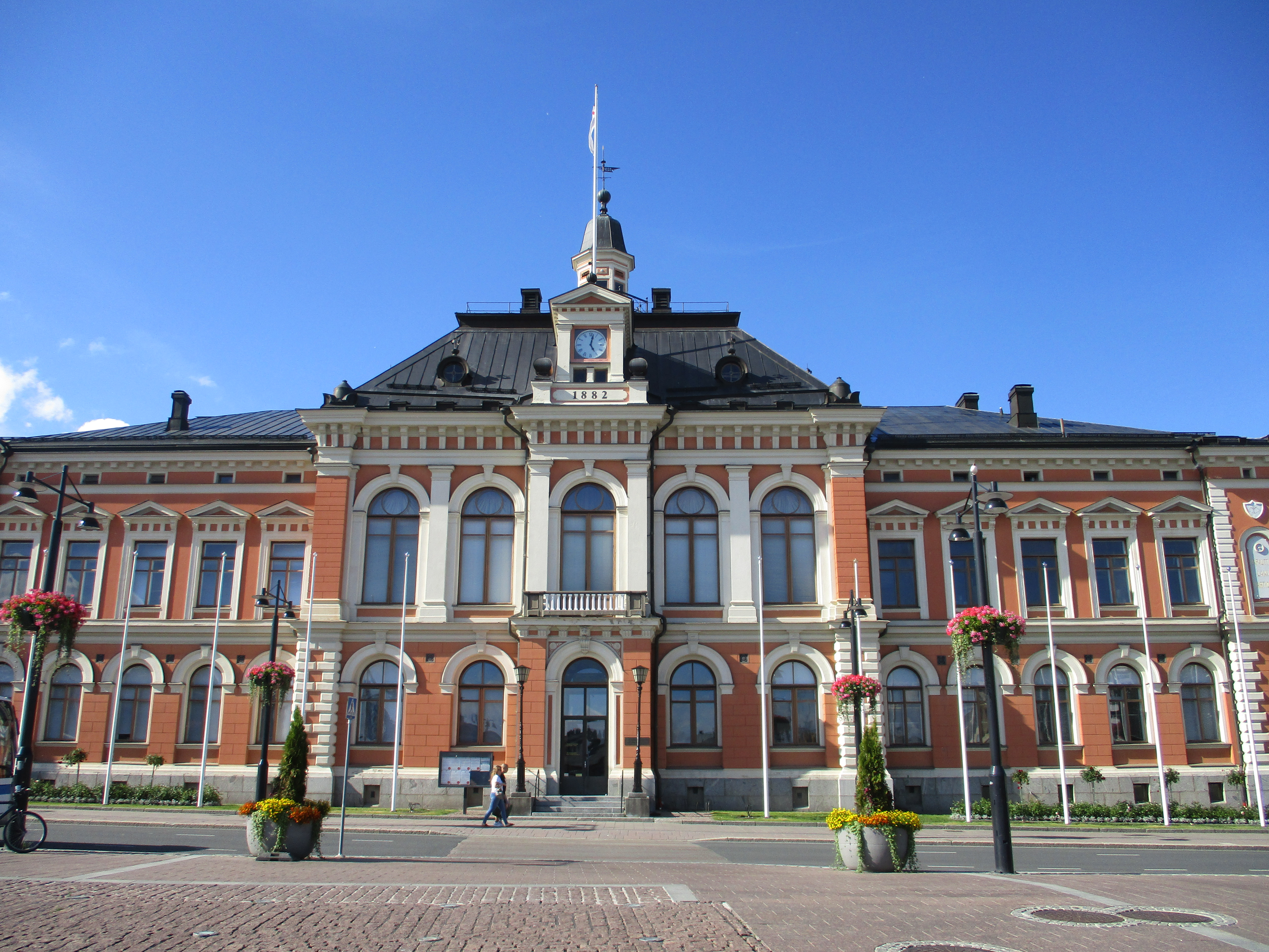 Kuopion kaupungintalo; building